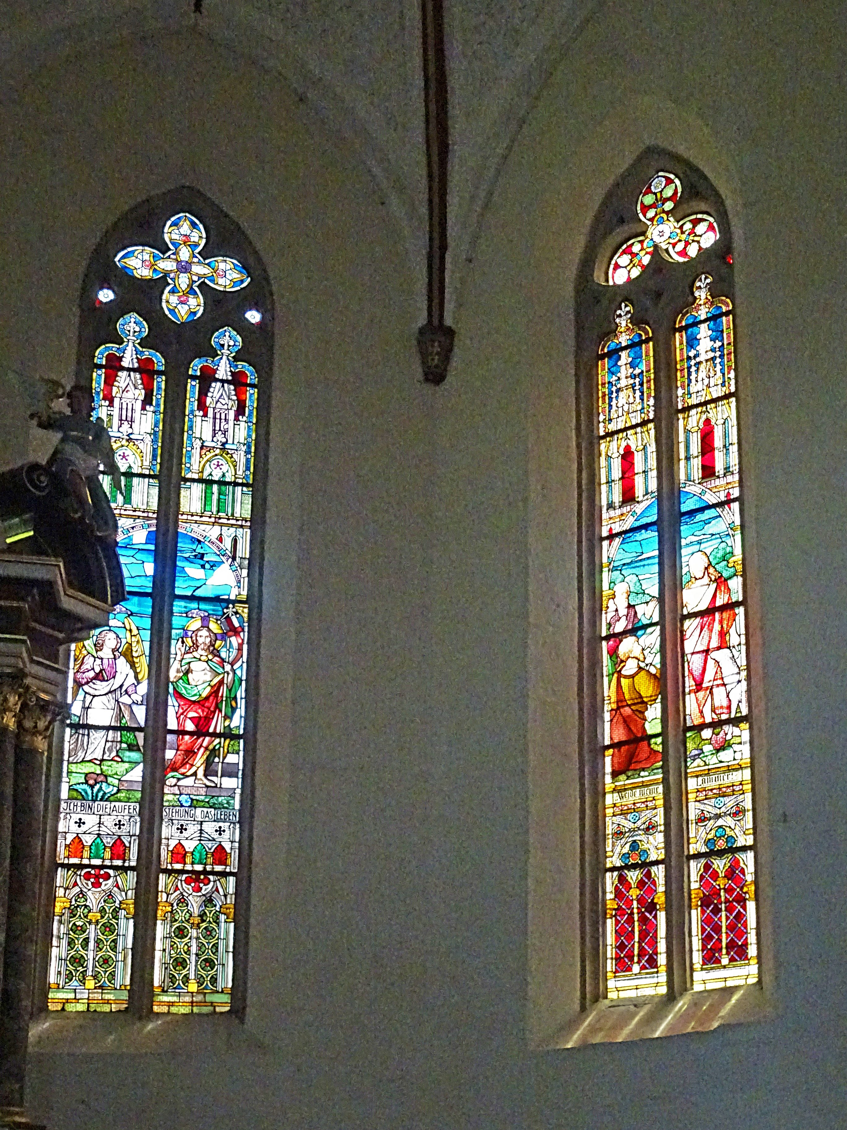 rechte Chorfenster aus den Berliner Glasmalerwerkstätten in St. Petri (Mühlhausen, Thüringen)